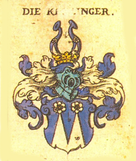 Stammwappen der Augsburger und Nürnberger Patrizierfamilie Rehlinger